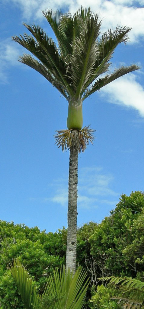 Nikau-Palme Rhopalostylis sapida